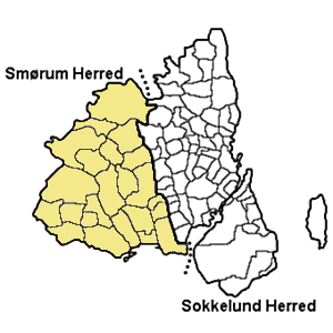 Smørum Herred Københavs Amt, Denmark Map by Svend-Erik Christiansen edit by Nico-dk/Nils Jepsen